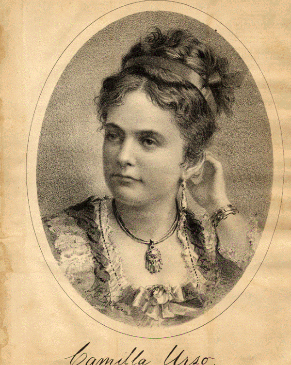 Portrait de la violoniste Camille Urso (1842-1902) , cliché photographique circa 1860/1870